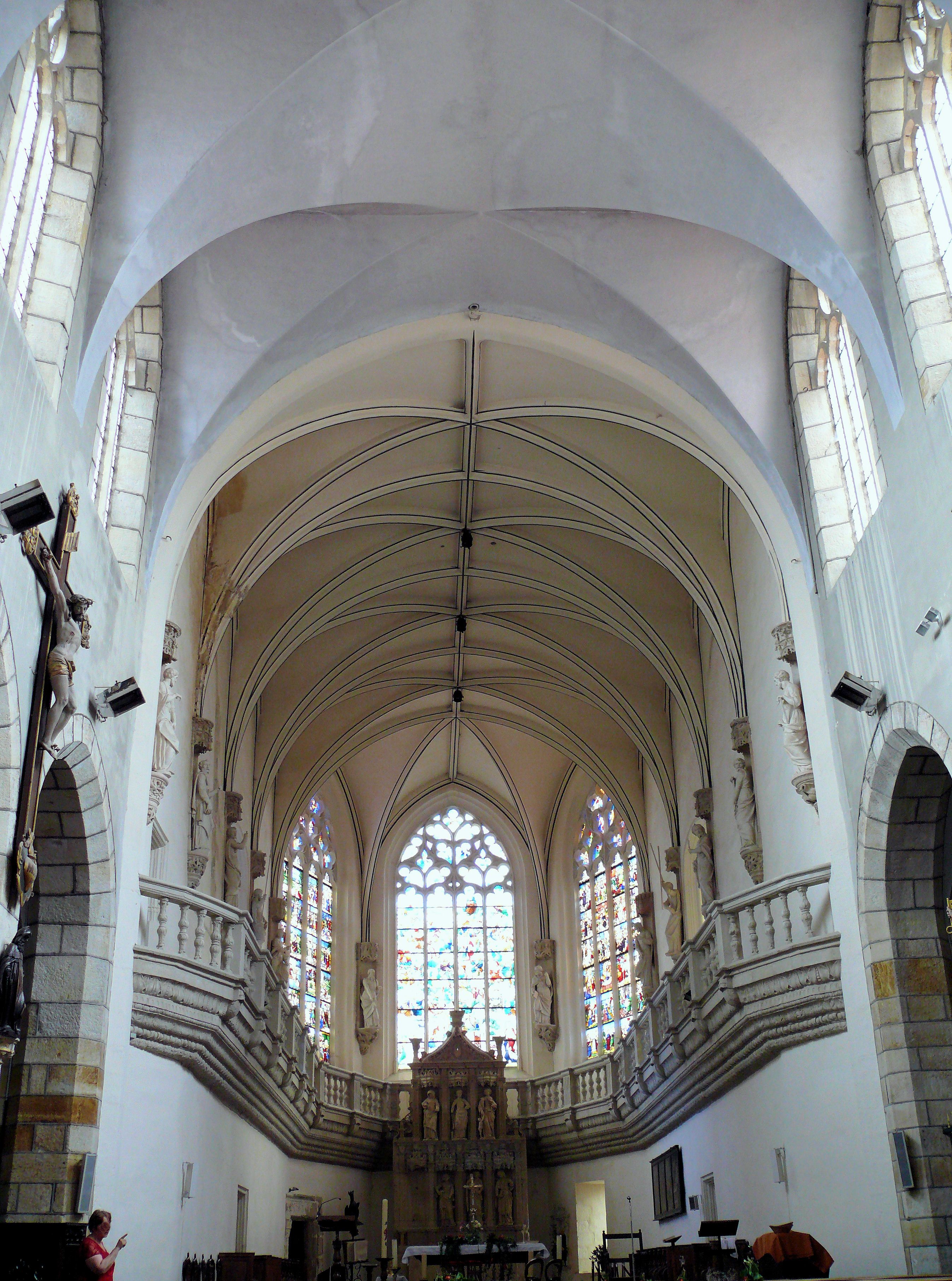 Vic-le-Comte - Sainte-Chapelle - Choeur